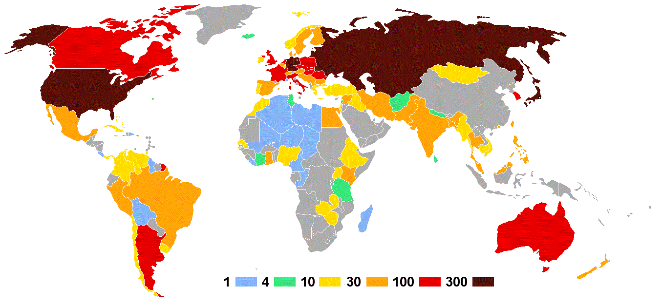 Olympische Sommerspiele 1964 — Anzahl der Athleten